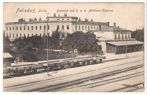 Artilleriekaserne in Felixdorf